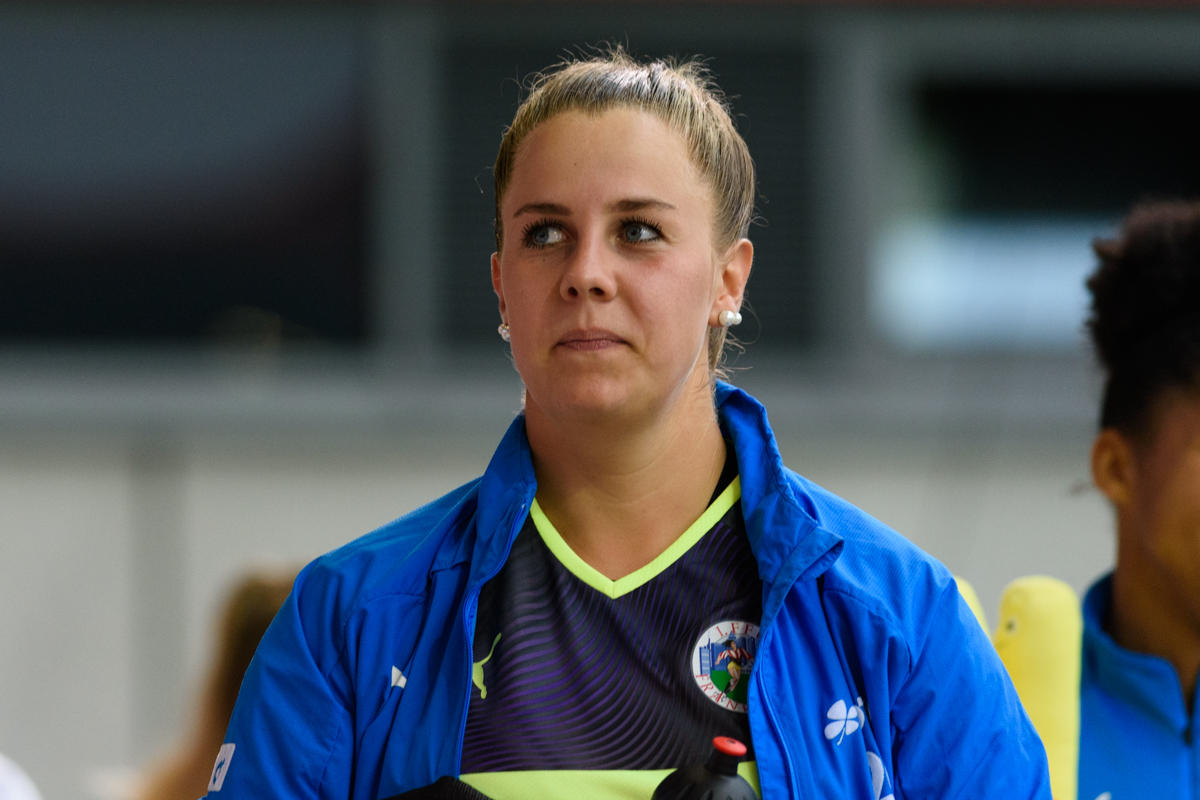 Cara Bösl 2019